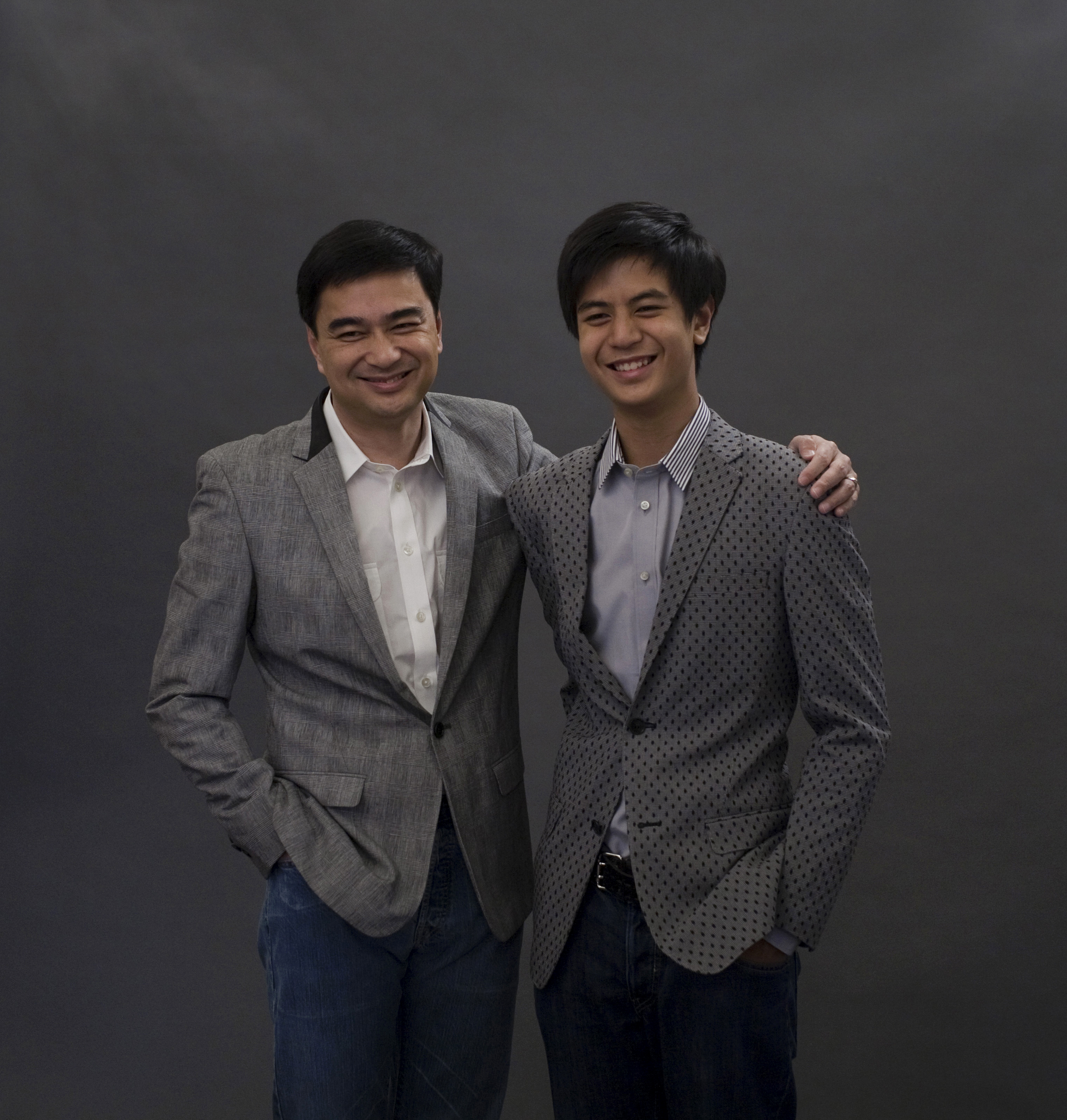 นิตยสาร LIPS สัมภาษณ์พิเศษนายกรัฐมนตรี ณ ห้องสีม่วง ตึกไทยคู่ฟ้า ทำเนียบรัฐบาล วันอาทิตย์ ที่ 22 สิงหาคม พ.ศ.2553 (Photographer attached to the Prime Minister of the Kingdom of Thailand : Peerapat Wimolrungkarat / พีรพัฒน์ วิมลรังครัตน์)